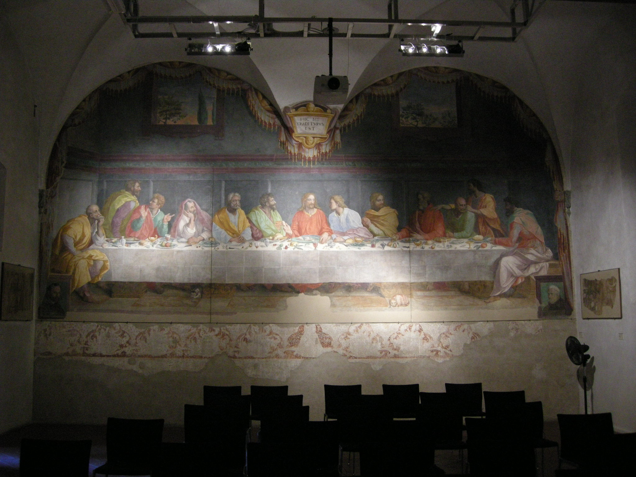 Carmine, cenacolo di alessandro allori, 00